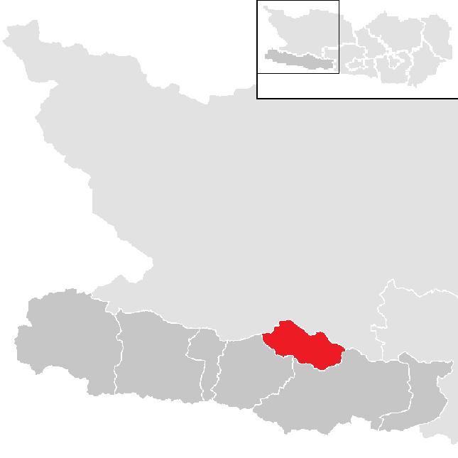 Bezirk Hermagor